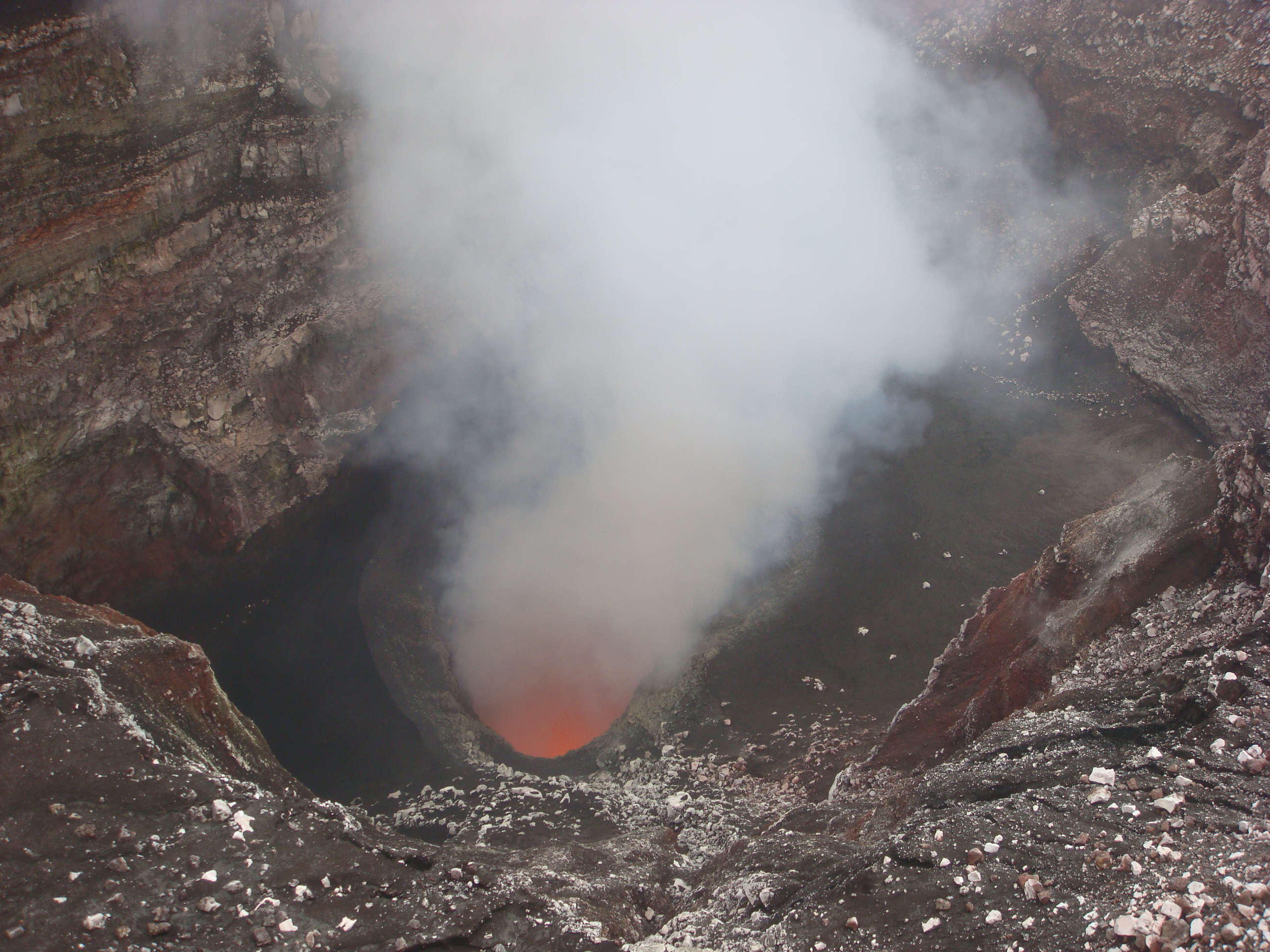 Un des cratères secondaires du Benbow.